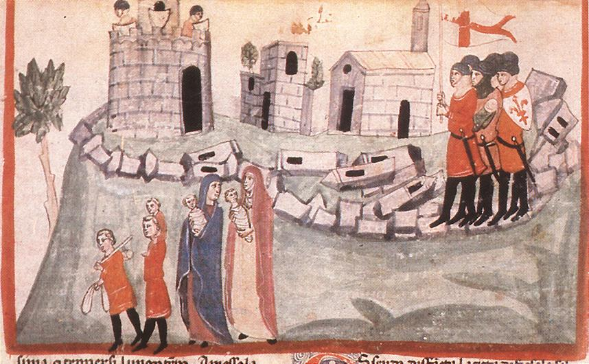 Chig.L.VIII.296 49v